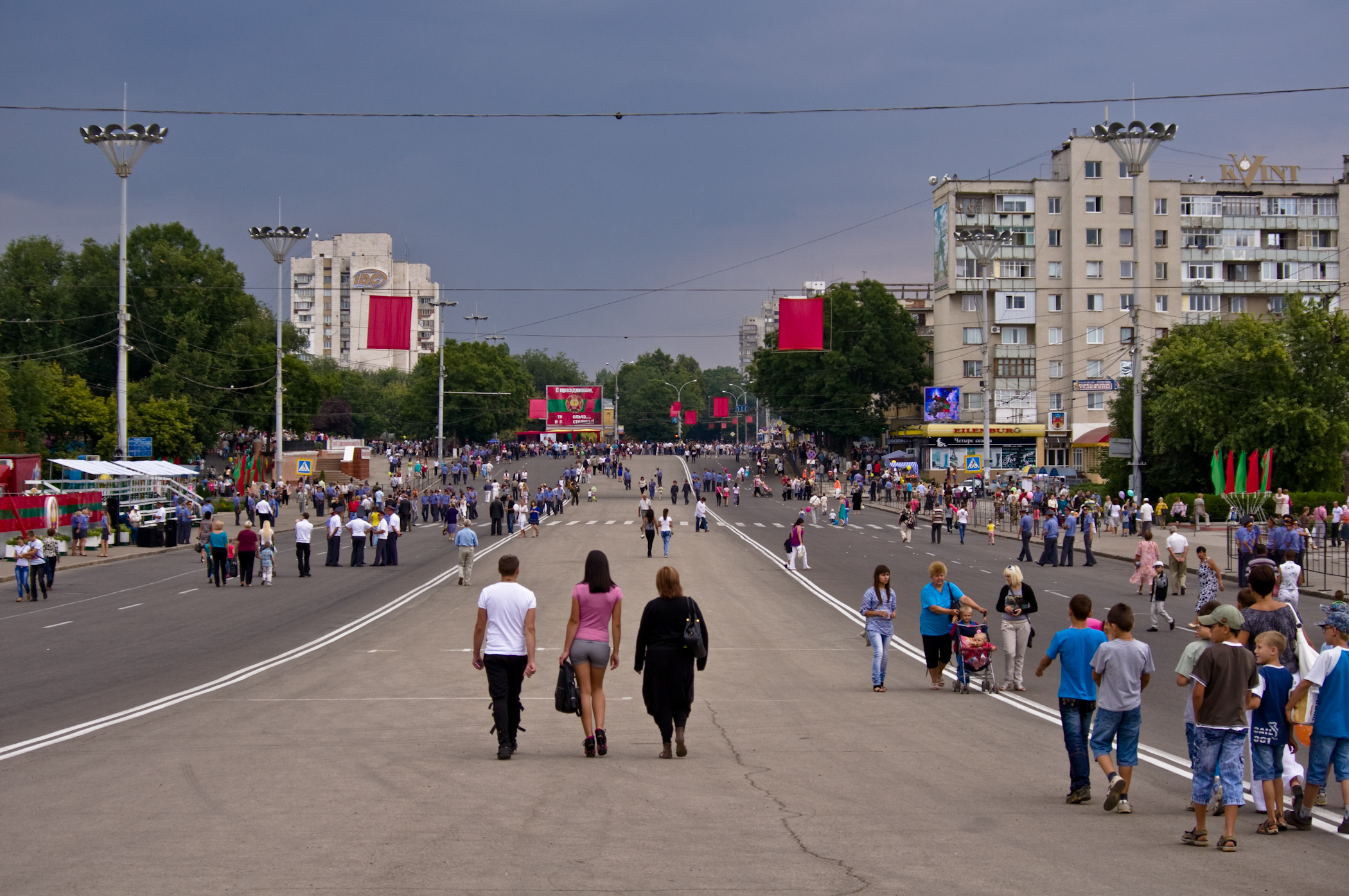 Площадь Суворова после парада в честь 21 годовщины образования ПМР.